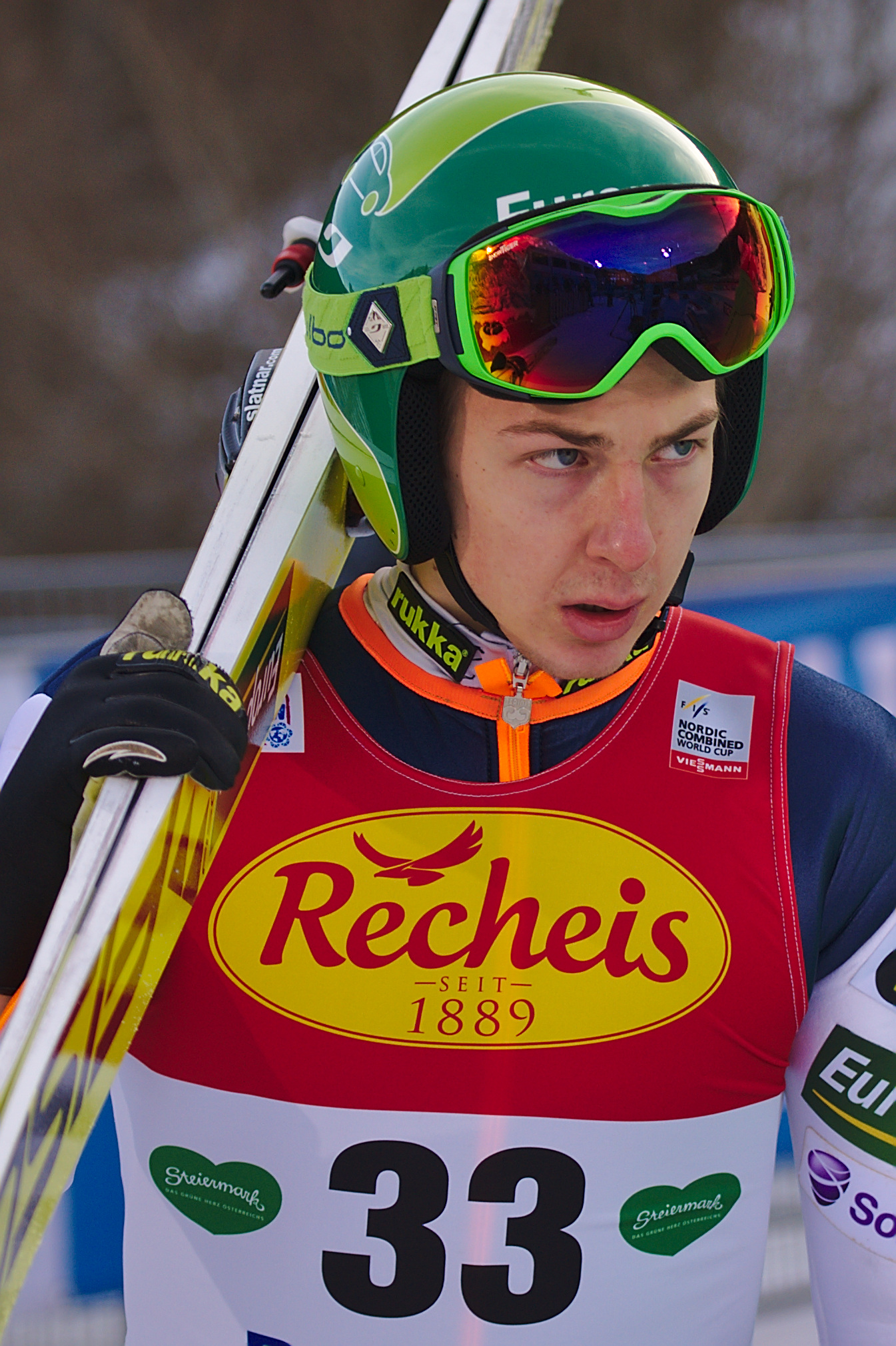 FIS Worldcup Nordic Combined Ramsau 2016. Bild zeigt Ilkka Herola (FIN)